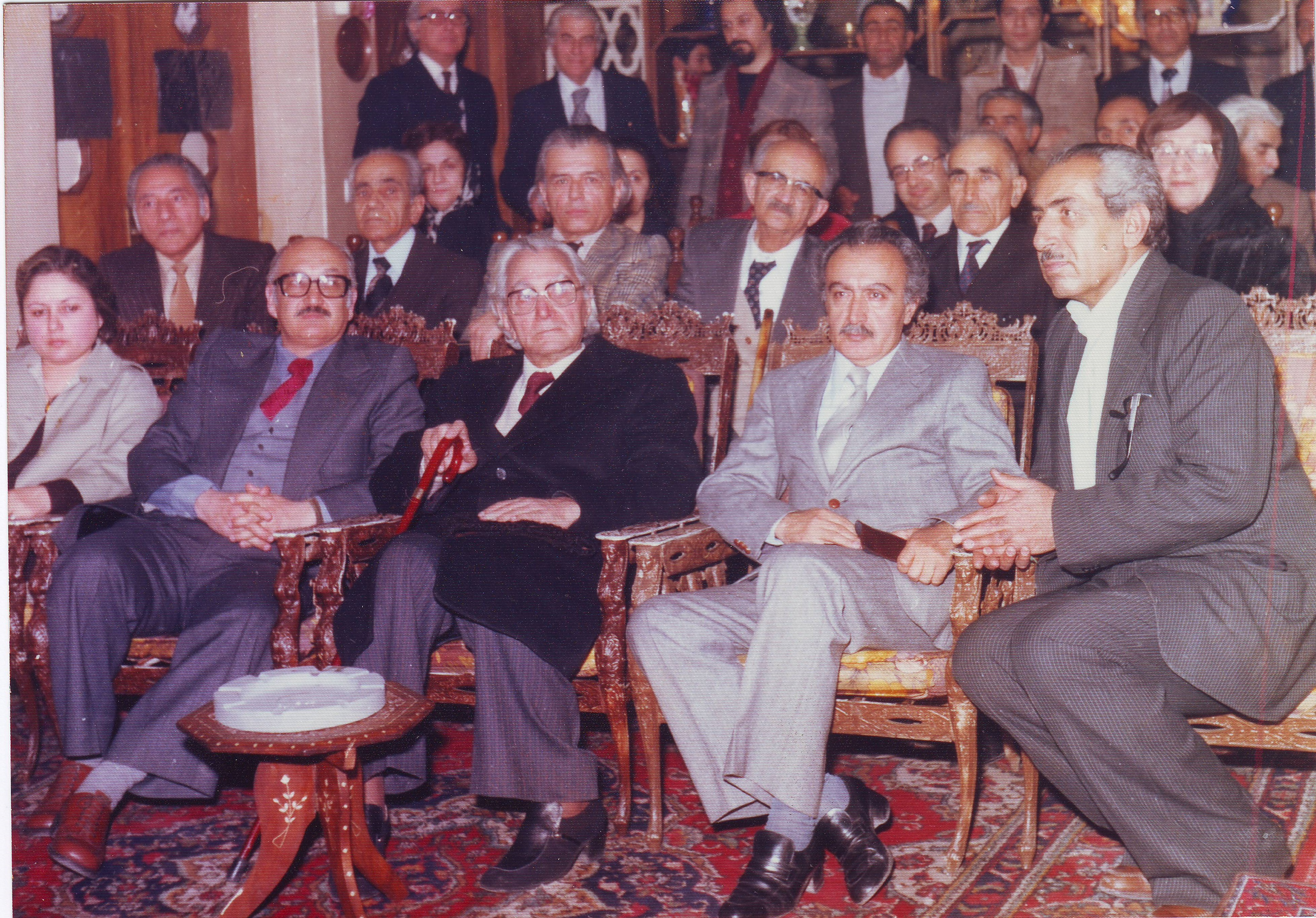 1358 باشگاه جبهه ملی ایران